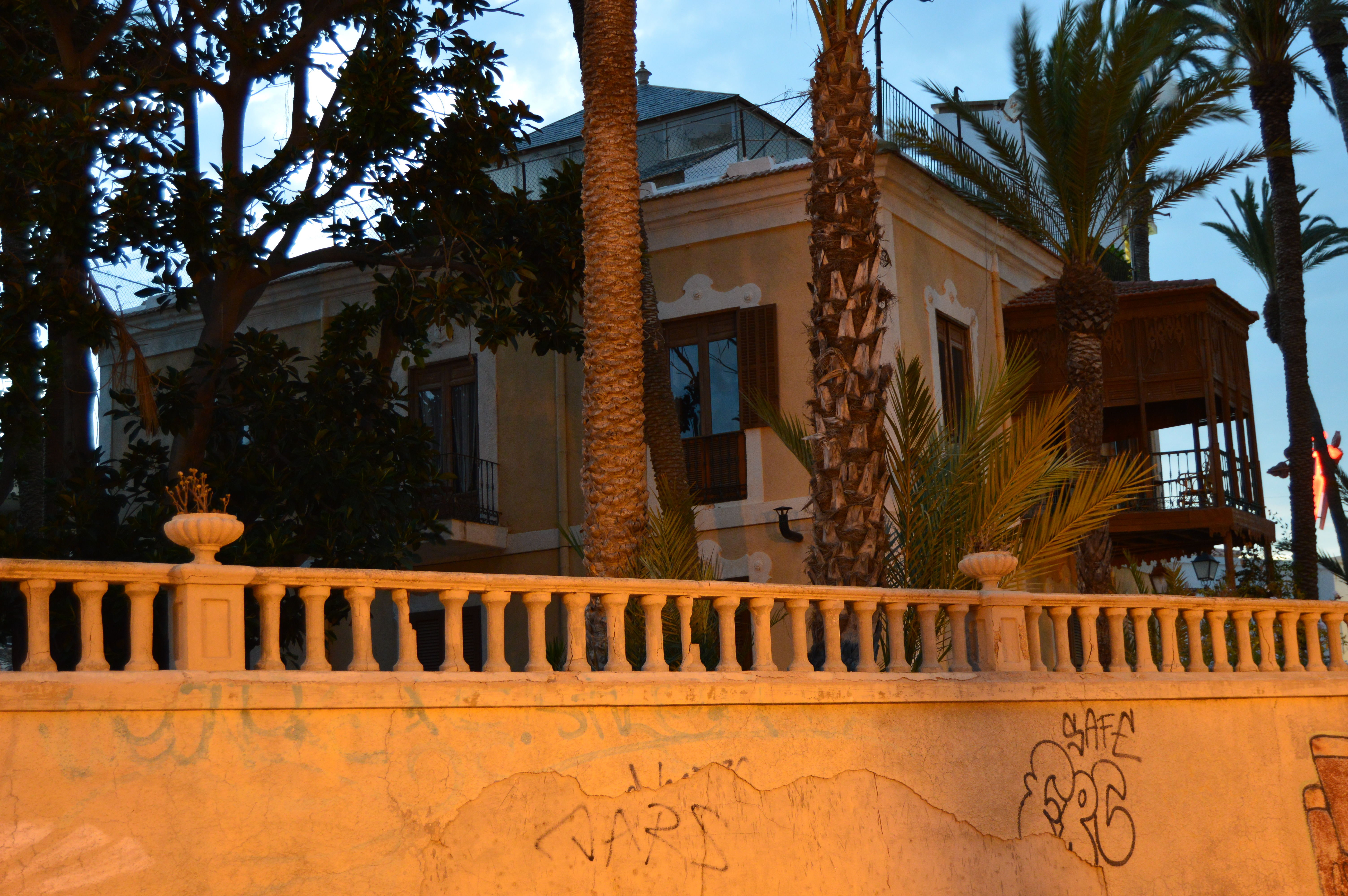 Chalet Barnuevo